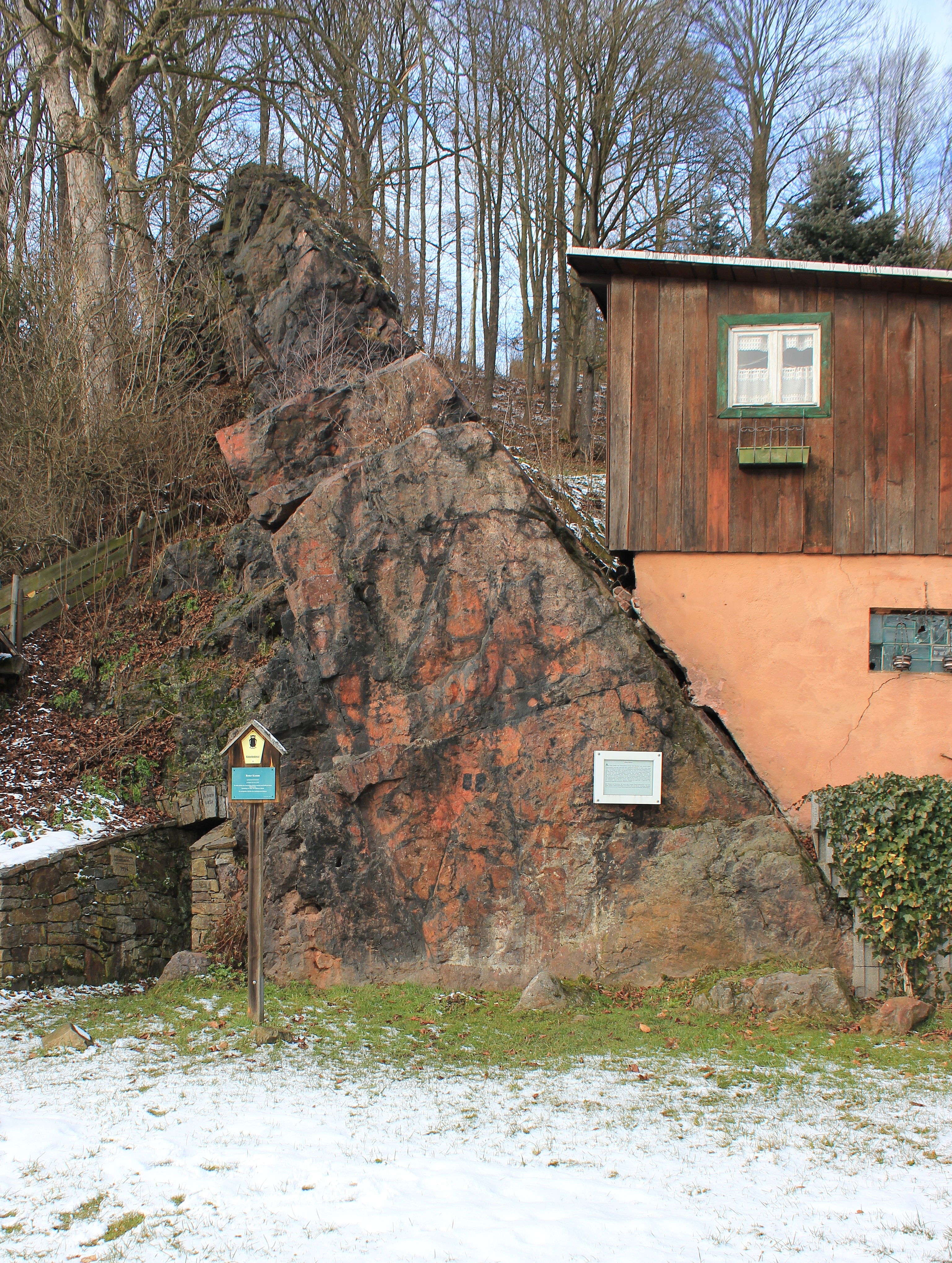 Das Geotop „Roter Kamm“ am Zechenplatz in Bad Schlema - ein herausragendes geologisches Naturdenkmal.